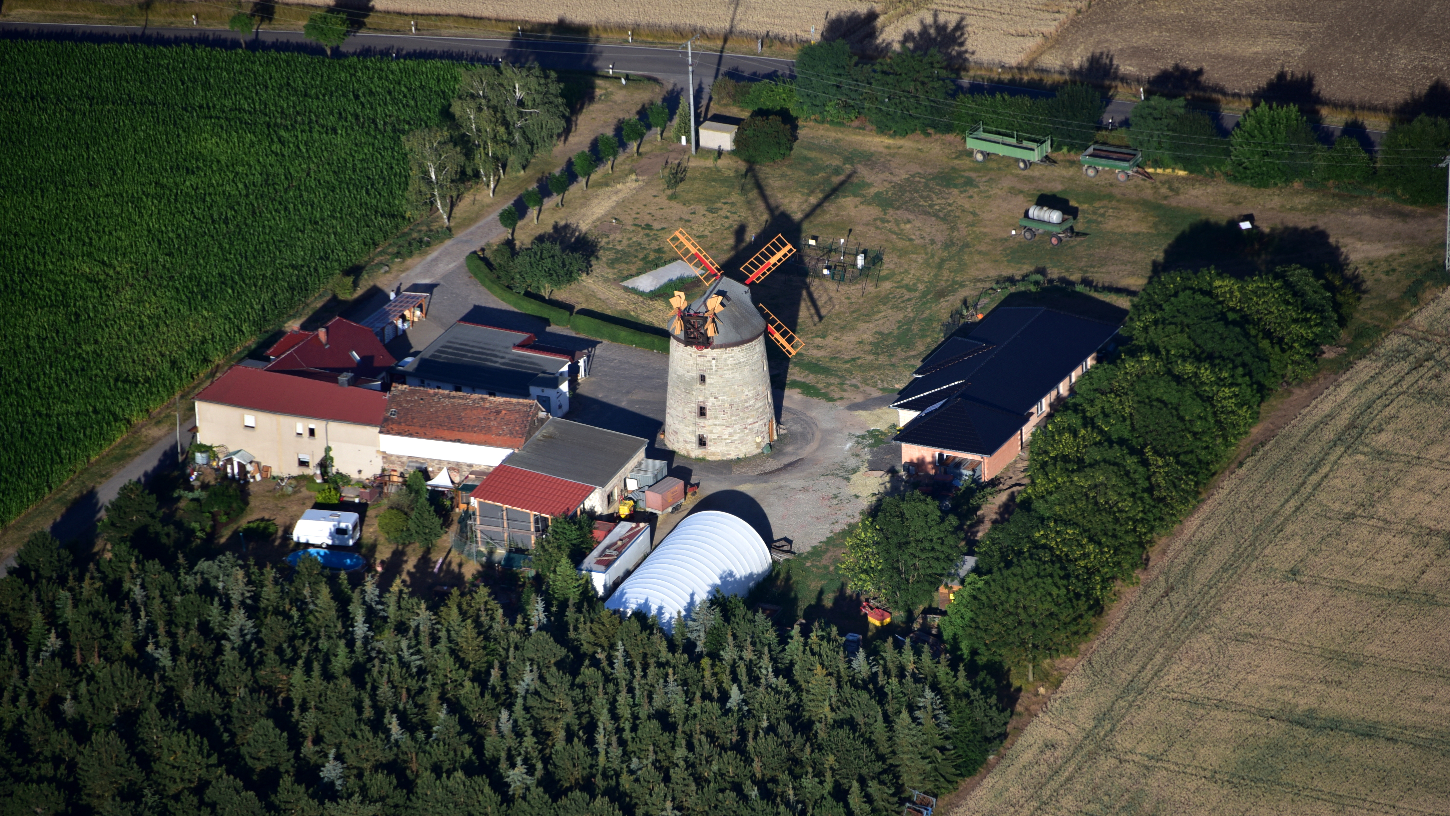 Mühle Lodersleben, Gatterstädter Straße 8, Luftaufnahme (2018)